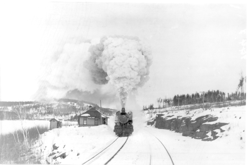 Titre Winter - freight train at Farlane, Ont. Numéro d'identification 02304 Ampleur N/A date [ca. 1930] Portée et contenu Railway Stations Description physique 1 Print Créateur N/A Emplacement Farlane, Ontario, Canada Géolocalisation N/A Nom de la collection CN Images of Canada Collection Mots clés Winter - freight train at Farlane, Ont. A freight train passes Farlane Station in winter Un train à cargaison passe par la gare Farlane en hiver Railway Stations Farlane, Ontario, Canada [ca. 1930] Stations, Canadian National Railways, Gares, Chemins de fer nationaux du Canada CN Images of Canada Collection Notes générales N/A Droits et autorisations Public domain. CC0